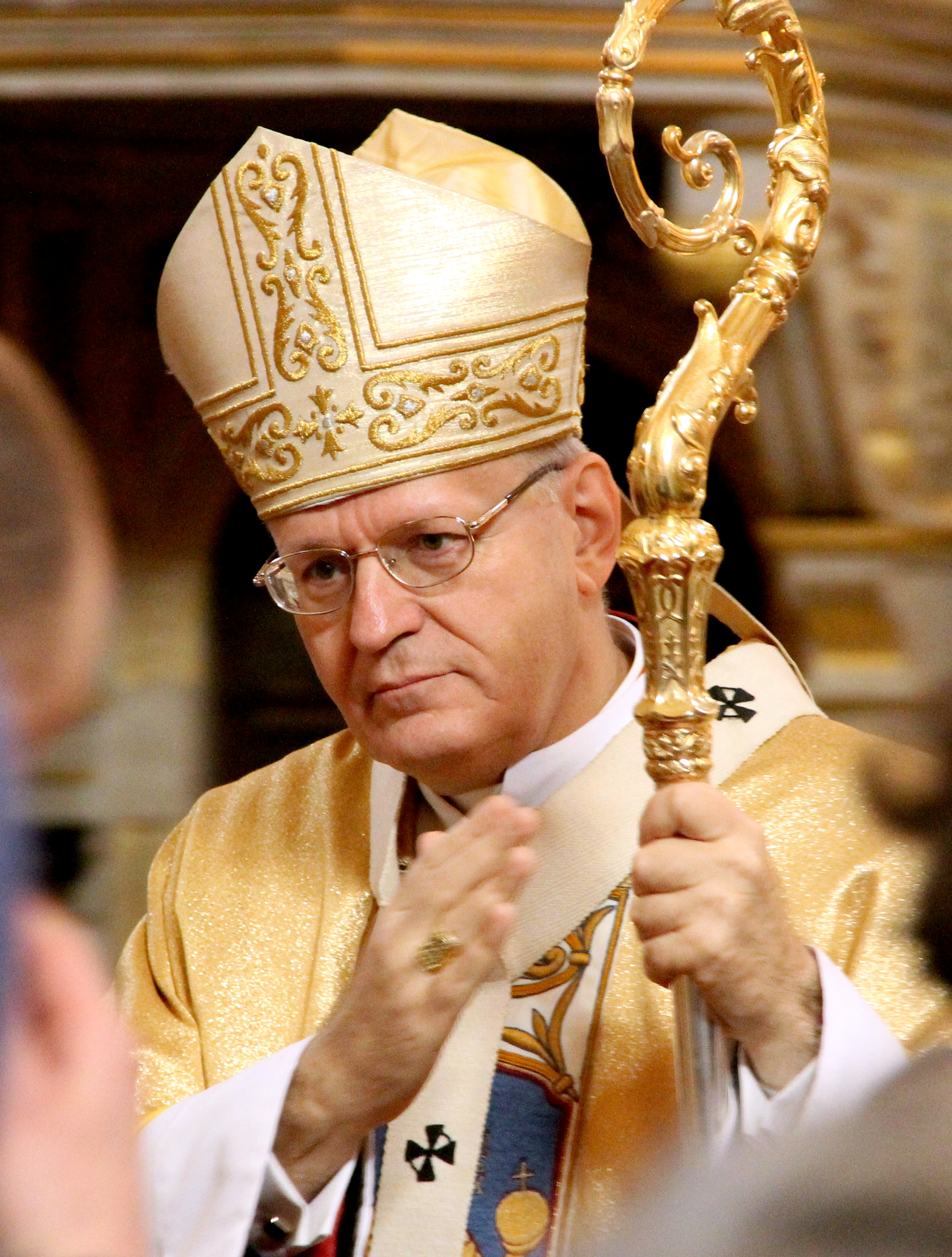 Erdő Péter a budapesti Szent István bazilikában, a nagycsütörtöki olajszentelő misén.